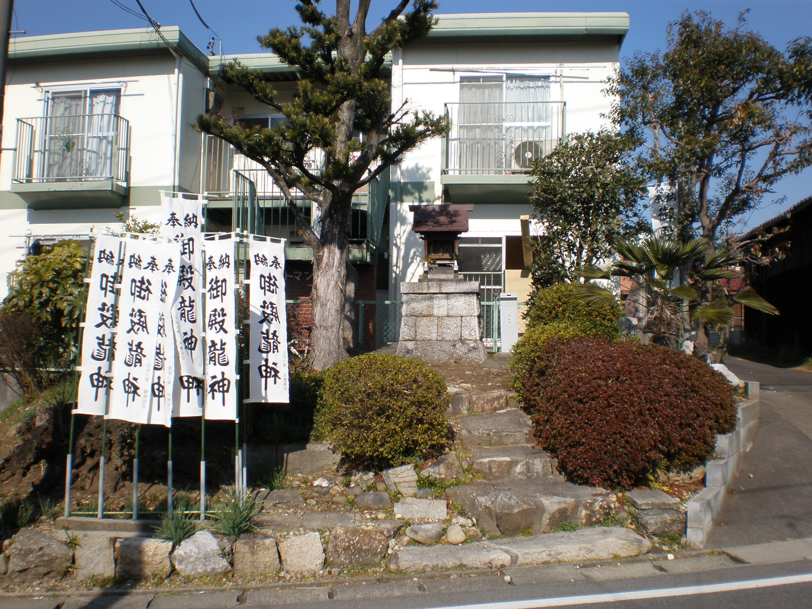 愛知県小牧市にある御殿龍神